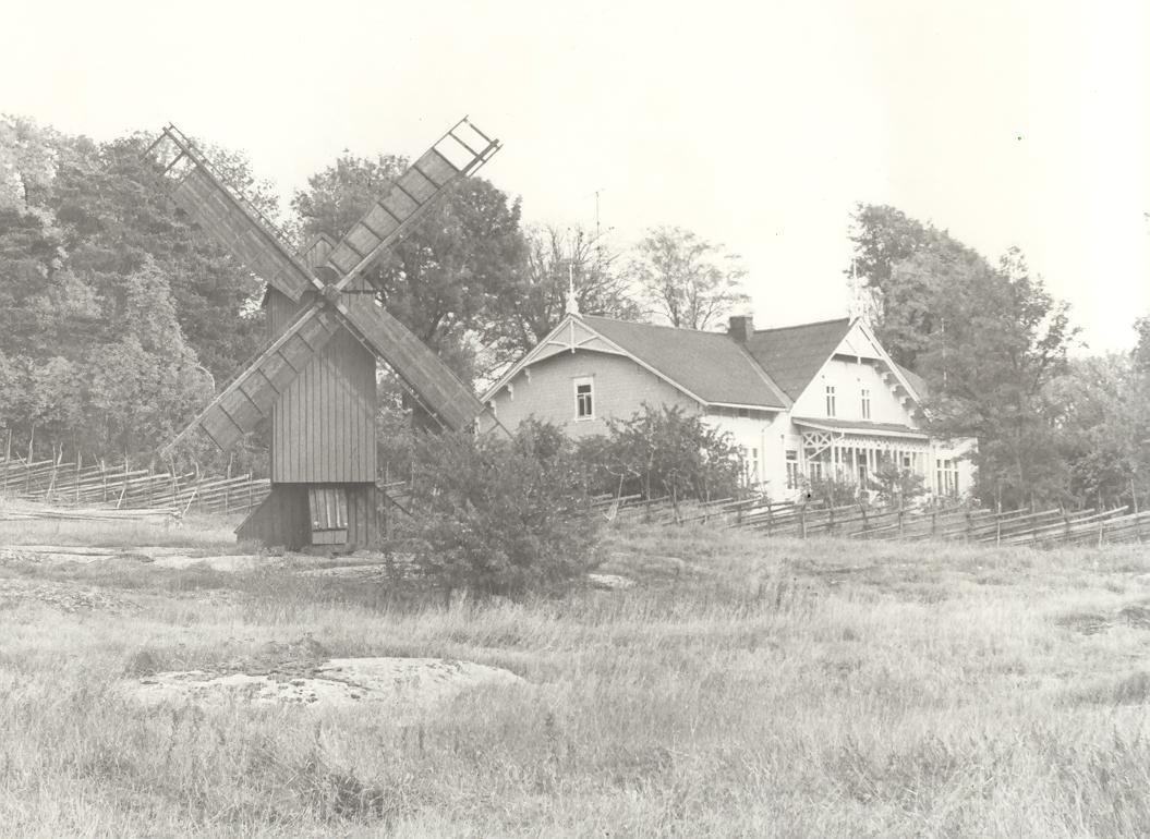 Finströms prästgård på Åland (1990), en bild tagen av Harri Blomberg.